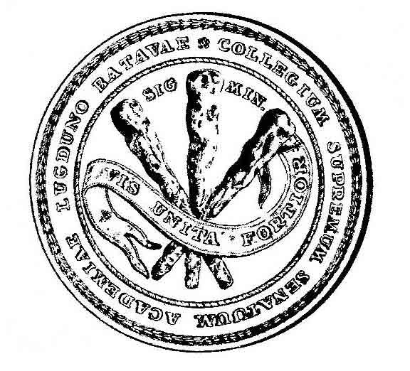 Sigillum Minor Collegium Supremum Senatuum Academiae Lugduno Batavae